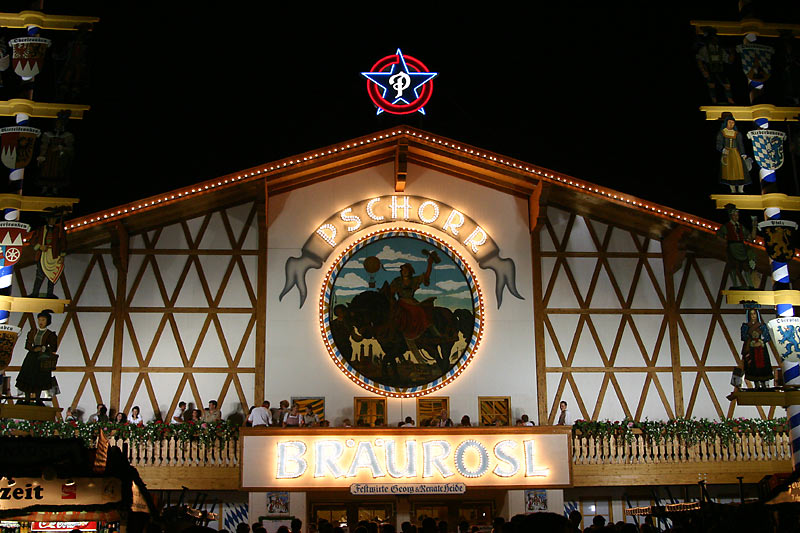 Bräurosl Festzelt (tent of the Hacker-Pschorr brewerie)